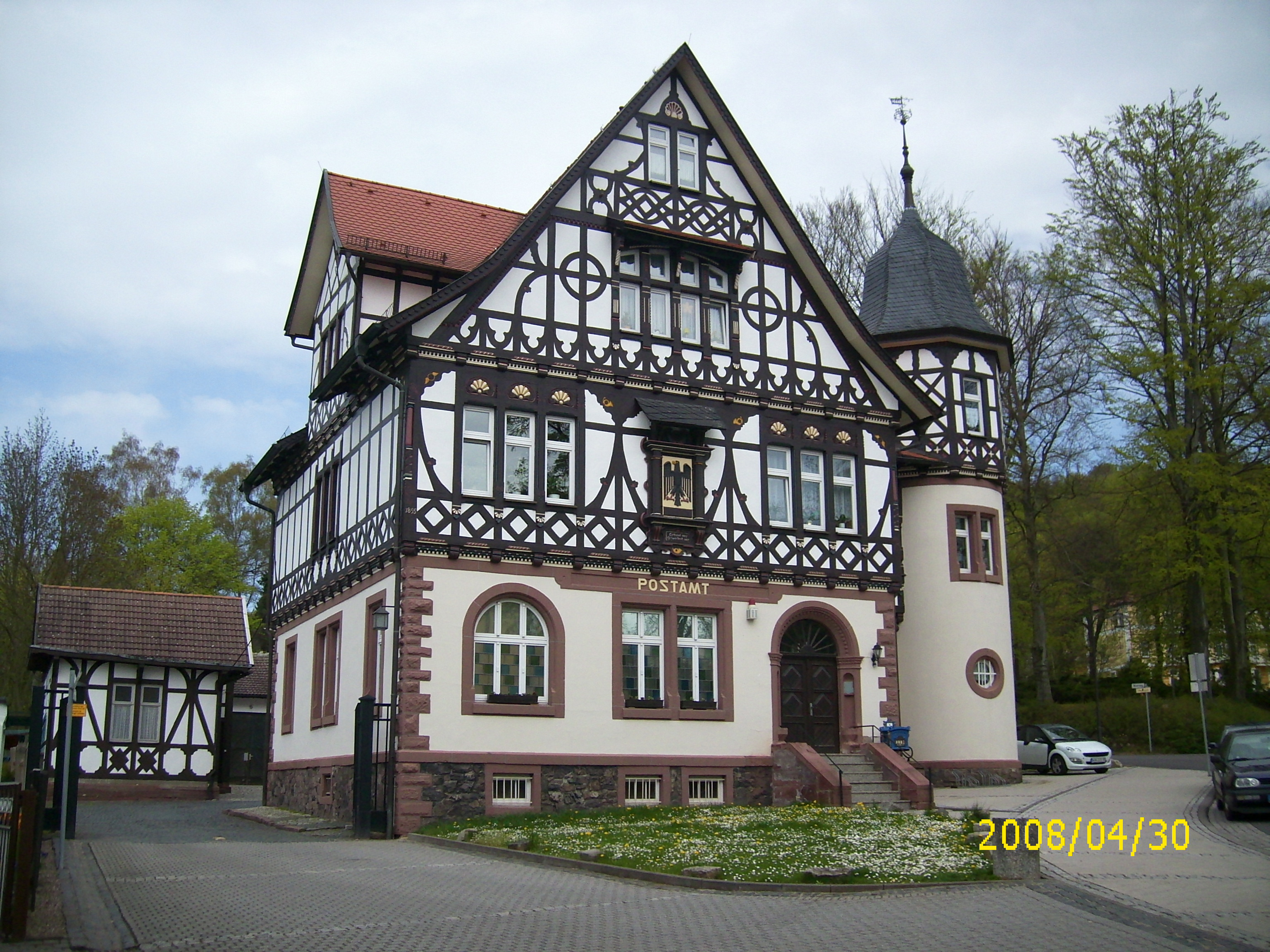 Postamt Bad Liebenstein